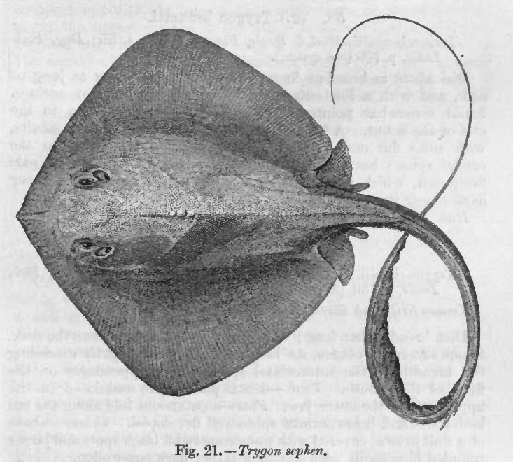 Trygon sephen = Pastinachus sephen (Forsskål, 1775)